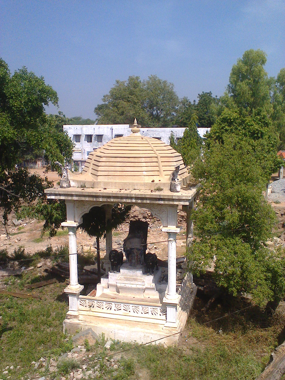 శిథిలమైన సోమన విగ్రహం యొక్క పీఠం